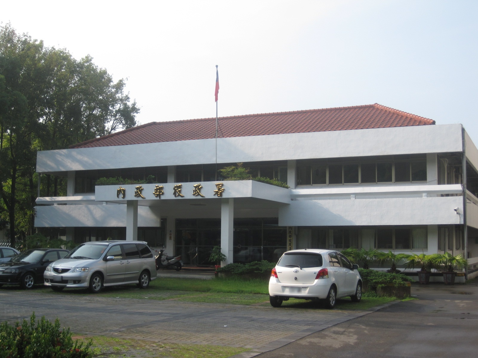 中華民國內政部役政署廳舍